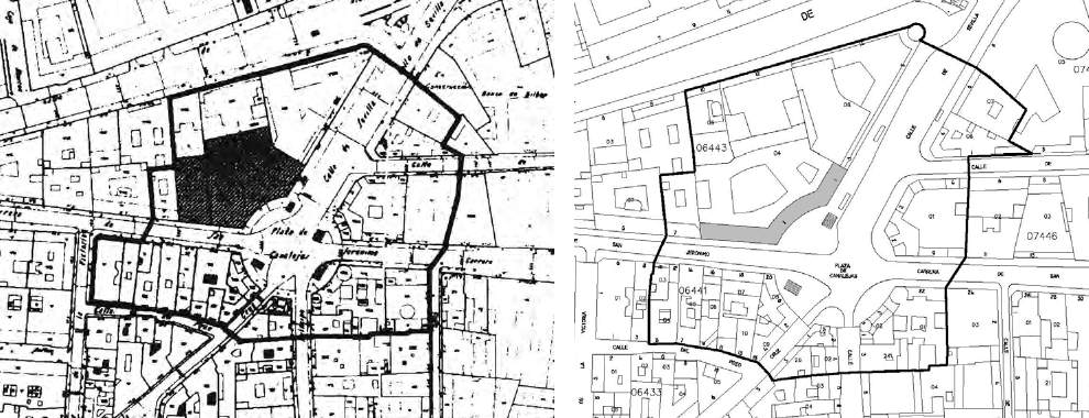 Imagen mostrando los mapas de protección como bien de interés cultural del edificio del Banco Hispano Americano. A la izquierda, la declaración de 1999, que protegía todo el edificio. A la derecha, la de 2013, que la circunscribía a la fachada y primera crujía.